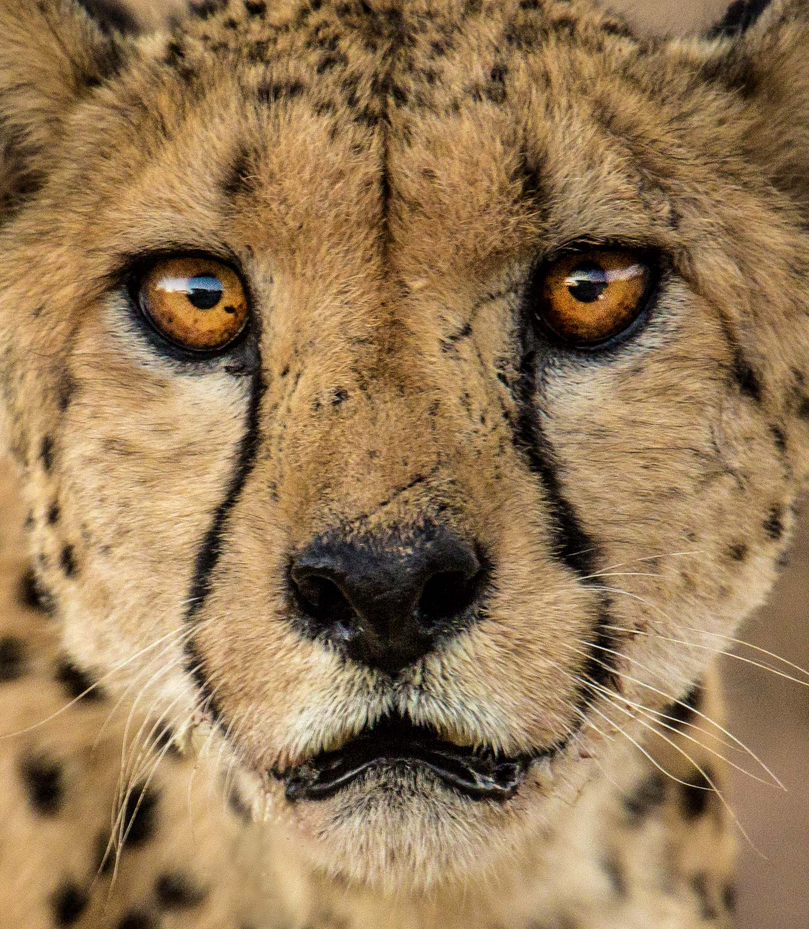 Gesicht eines Geparden in Namibia